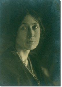 Lola Ridge (12 décembre 1873 - 19 mai 1941) est une poétesse anarchiste et une éditrice influente de publications féministes et marxistes.